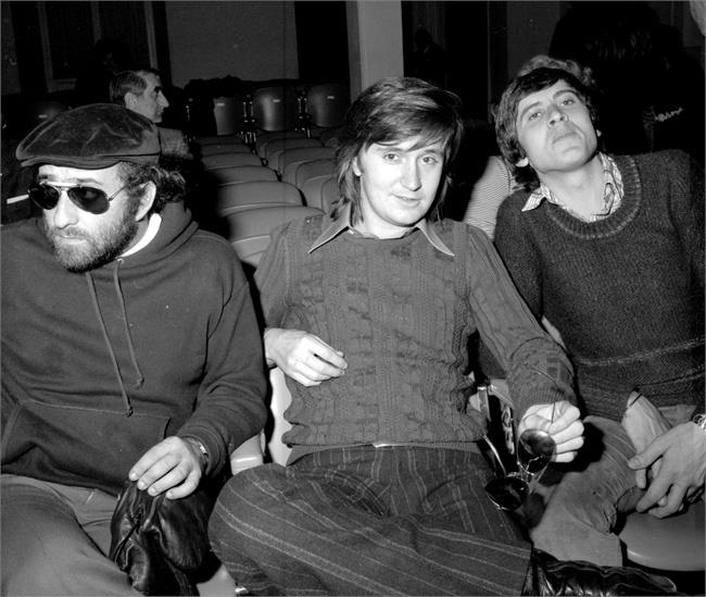 Lucio Dalla, Bobby Solo e Gianni Morandi al Festival di Sanremo 1972